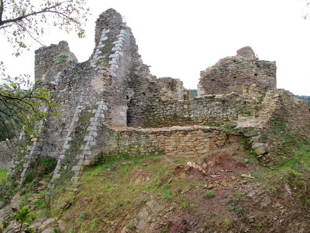 castell de Palagret al Gironés - Catalunya